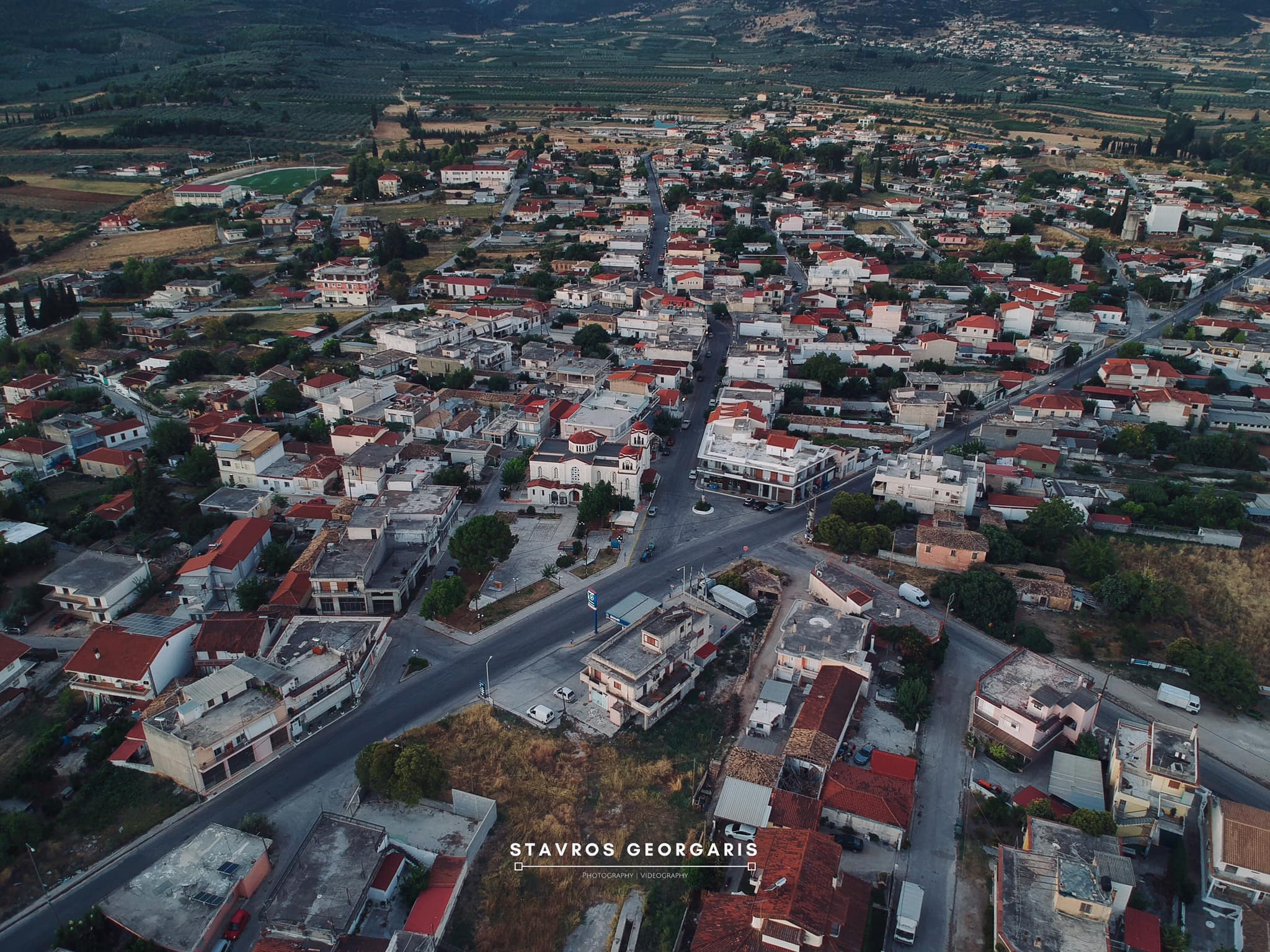 Πανοραμική άποψη του χωριού